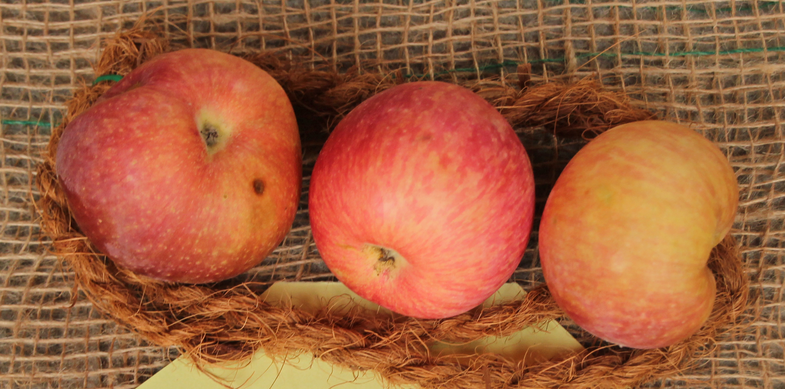 Bildinhalt: Äpfel der Sorte "Mcintosh" Aufnahmeort: Frankfurt am Main, Deutschland